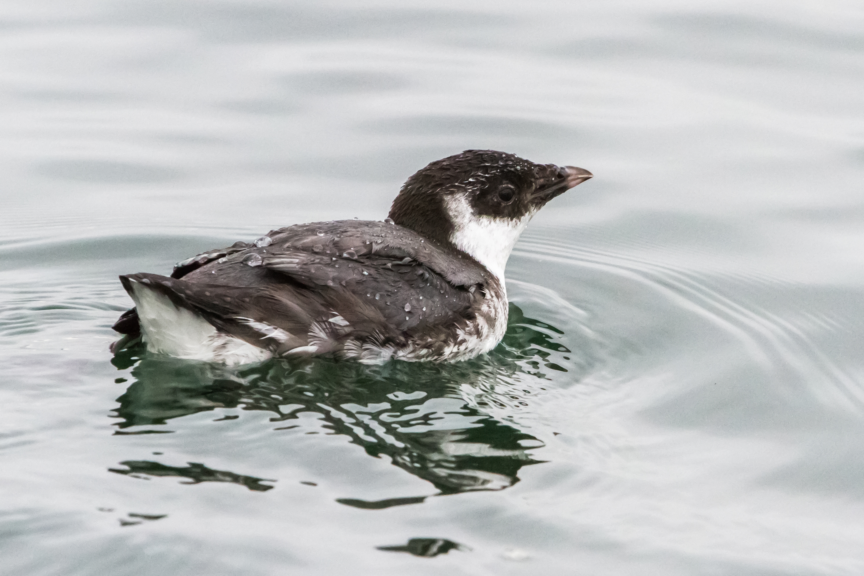 Ancient Murrelet. Semiahmoo Spit.